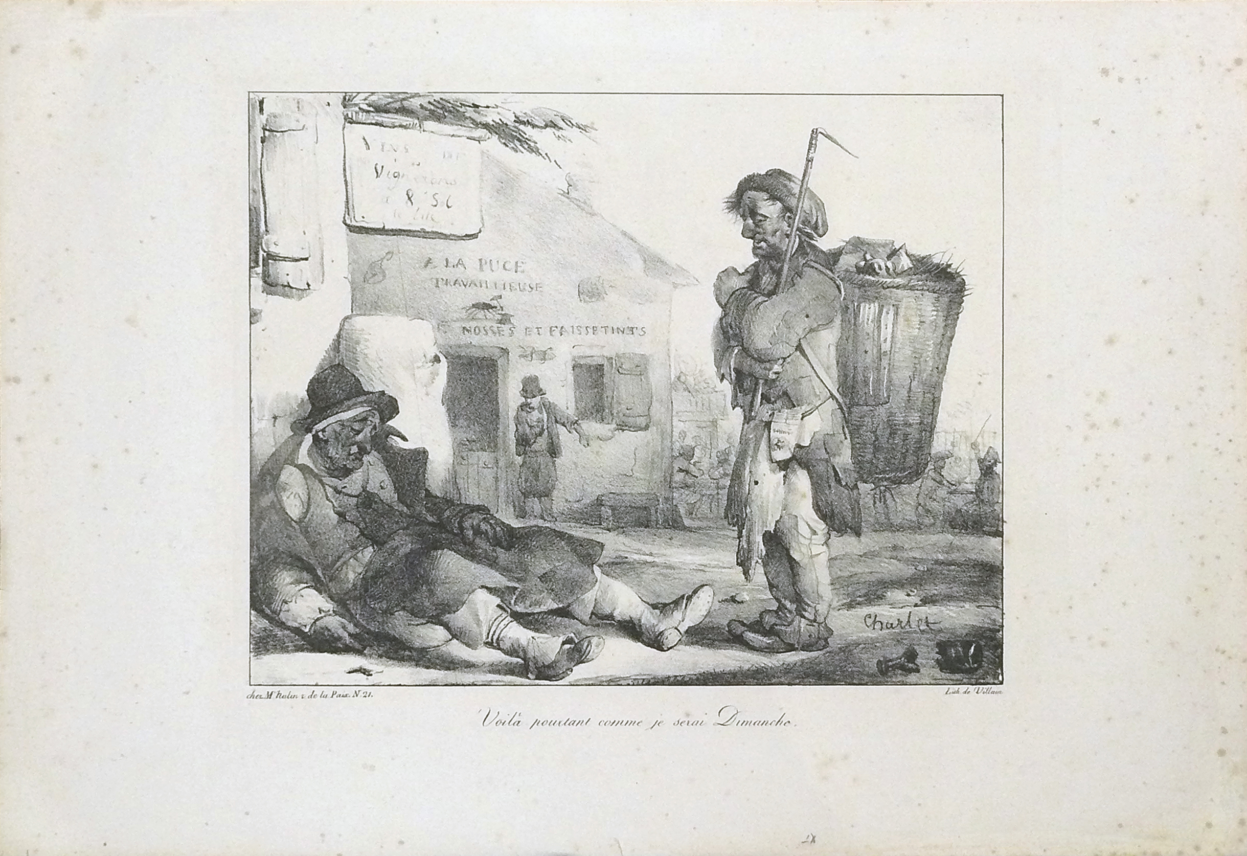 Charlet N.T. - Lithography - Voilà pourtant comme je serai dimanche - Sheet ~35x50.6cm, picture 24x30.5cm. Cette lithographie qui date de 1822 porte le numéro 280 du catalogue de La Combe (section VI : Pièces détachées). La Combe la décrit ainsi : « A la porte d'un cabaret, sur le mur duquel on a dessiné une puce près d'une enclume, et tenant un lourd marteau, avec ces mots : A la puce travailleuse, un chiffonnier s'est arrêté. Portant sa hotte, il se met au port d'armes, avec son crochet, contemplant avec admiration un vieil ouvrier tombé ivre mort à la porte du cabaret, puis il s'écrie : « Voilà pourtant comme je serai dimanche! » ; La Combe précise que cette pièce « est rarement transparente et harmonieuse de ton ».